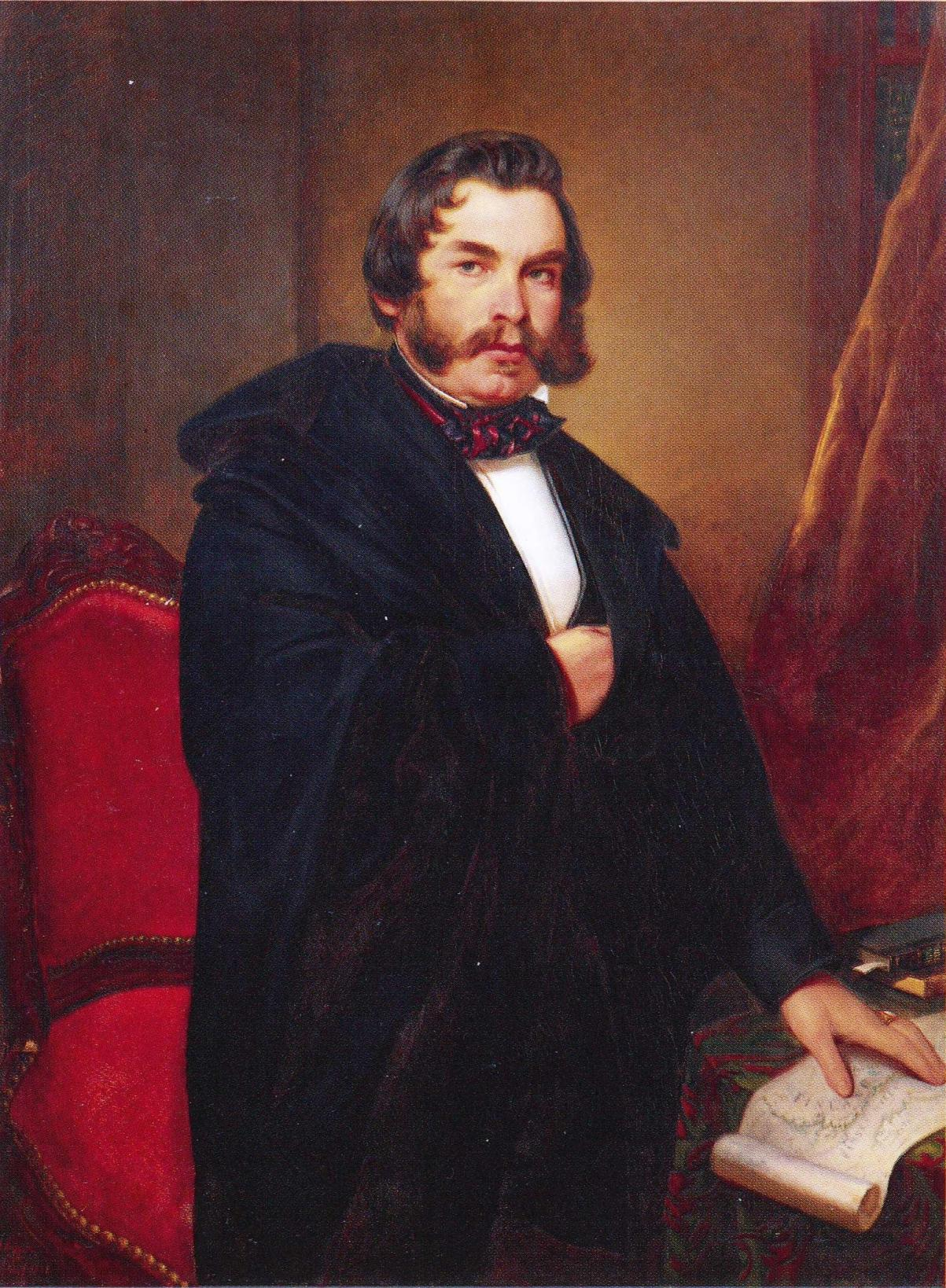 Helsingin yliopiston estetiikan ja nykyiskansain kirjallisuudne professori Fredrik Cygnaeus (1807–1881). Erik Johan Löfgren maalasi muotokuvan opiskeluvuosinaan Düsseldorfissa. Muotokuva kuuluu Helsingin yliopiston kokoelmiin.